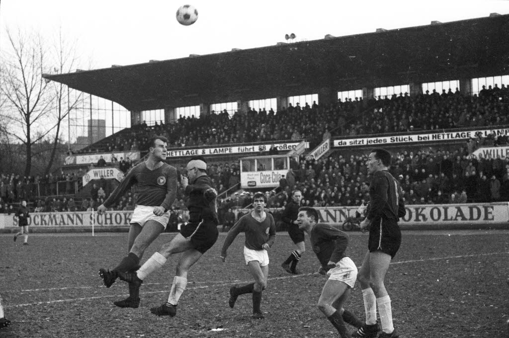 im Holsteinstadion. Im Bild u.a. Holsteins Günter Tams (2.v.l.), Rainer Skrotzki (4.v.l.) und Gerd Koll (6.v.l.).